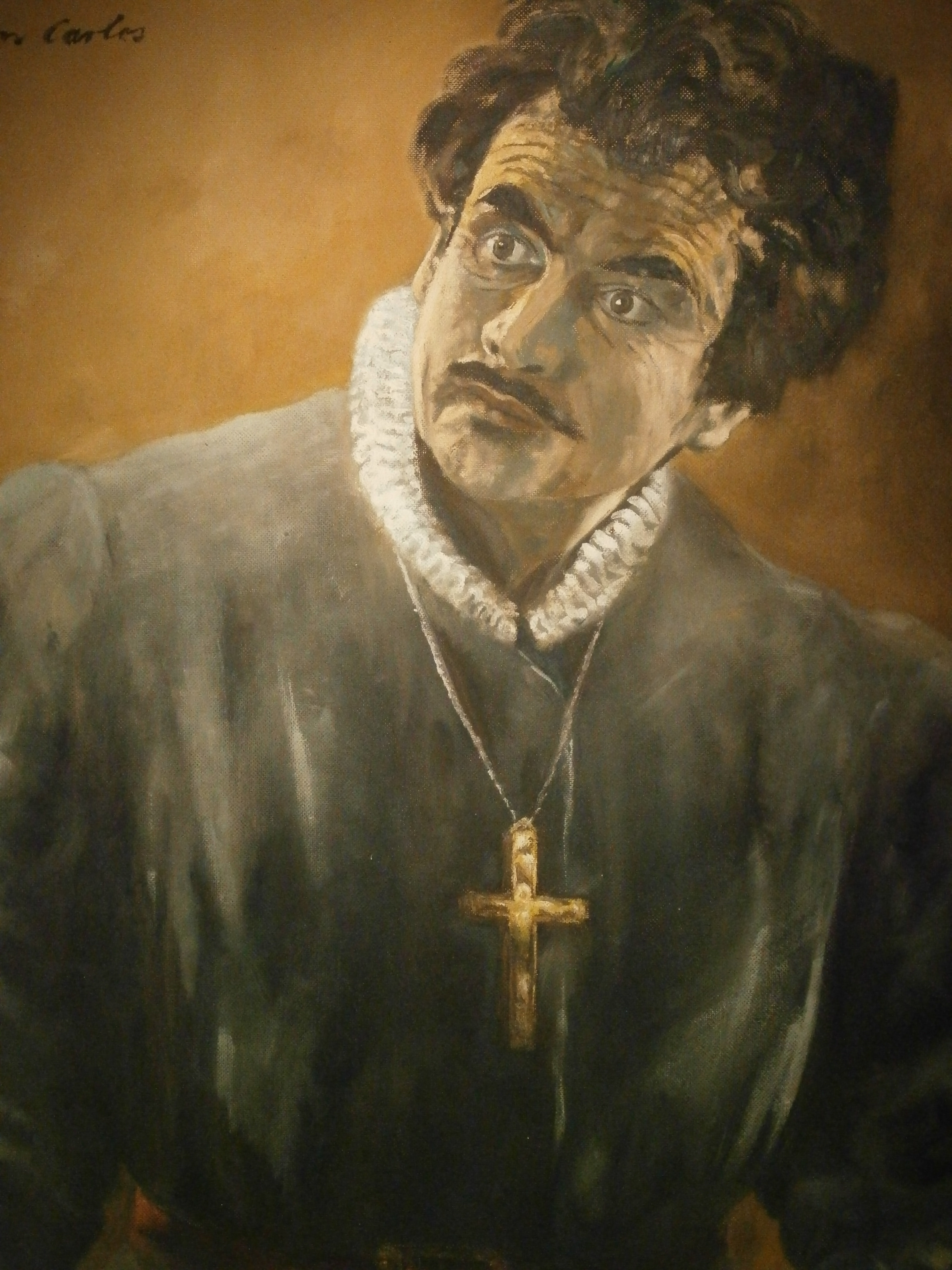 Christoph Reuland in der Rolle des "Don Carlos"